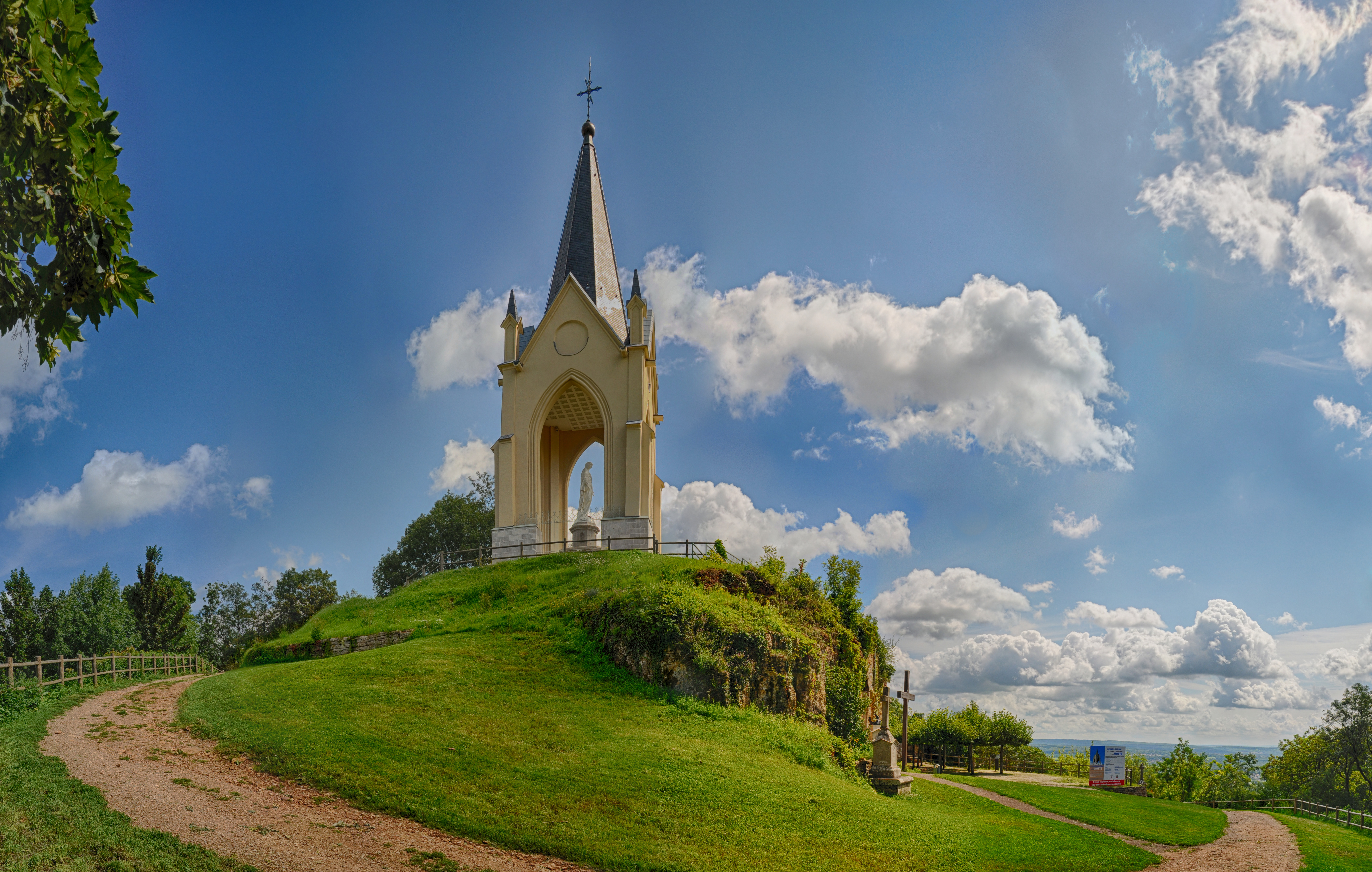 La Chapelle Notre-Dame de la Motte, à Vesoul, a été restaurée en 2013, avec notamment une restructuration de l'édifice et un nouvel éclairage.